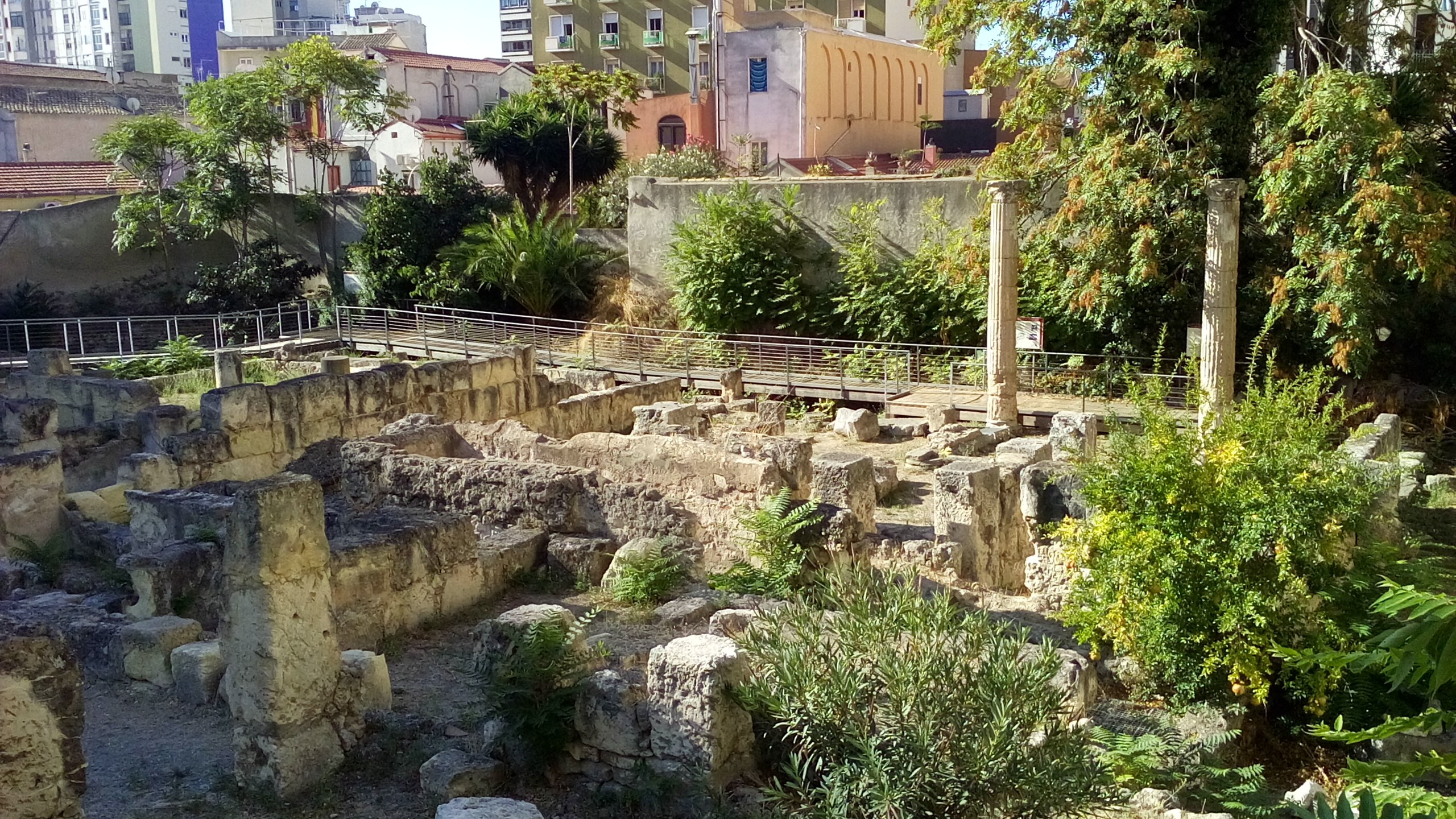 Villa di Tigellio This is a photo of a monument which is part of cultural heritage of Italy.